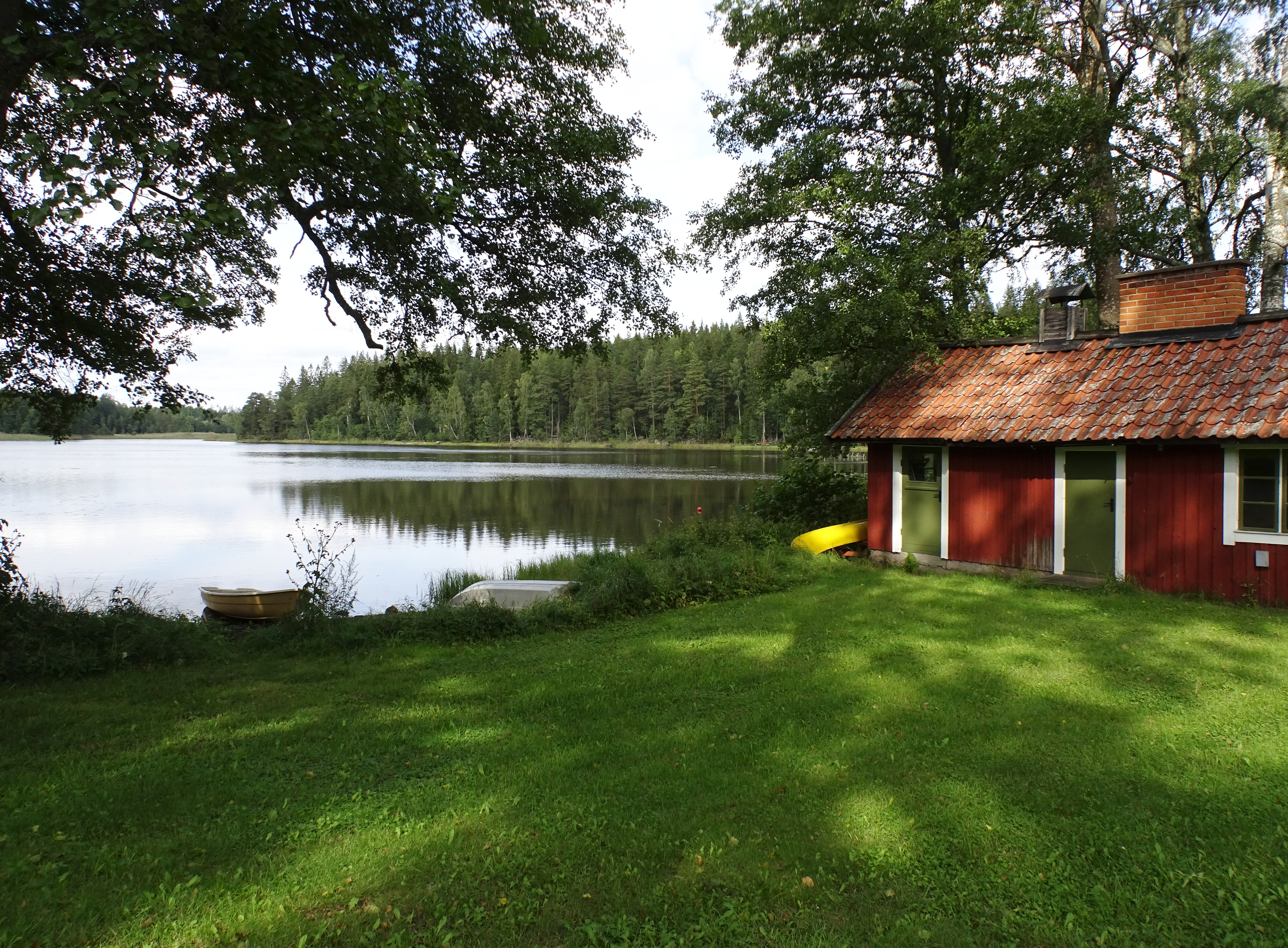 Vårsjön, Björndammens masugn